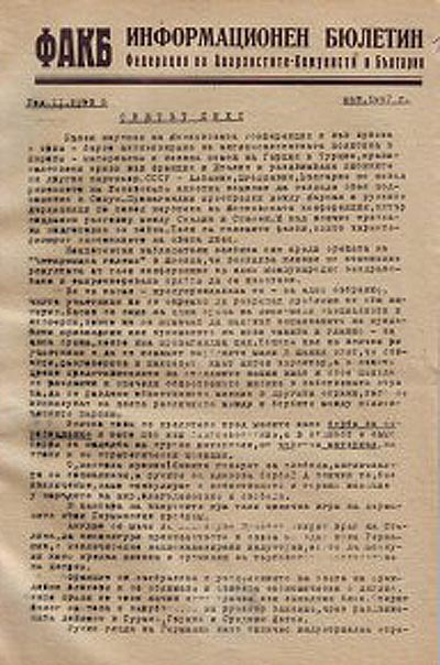 Циклостилно издание на "ФАКБ Информационен бюлетин", излиза от 1946 до 1948 г.